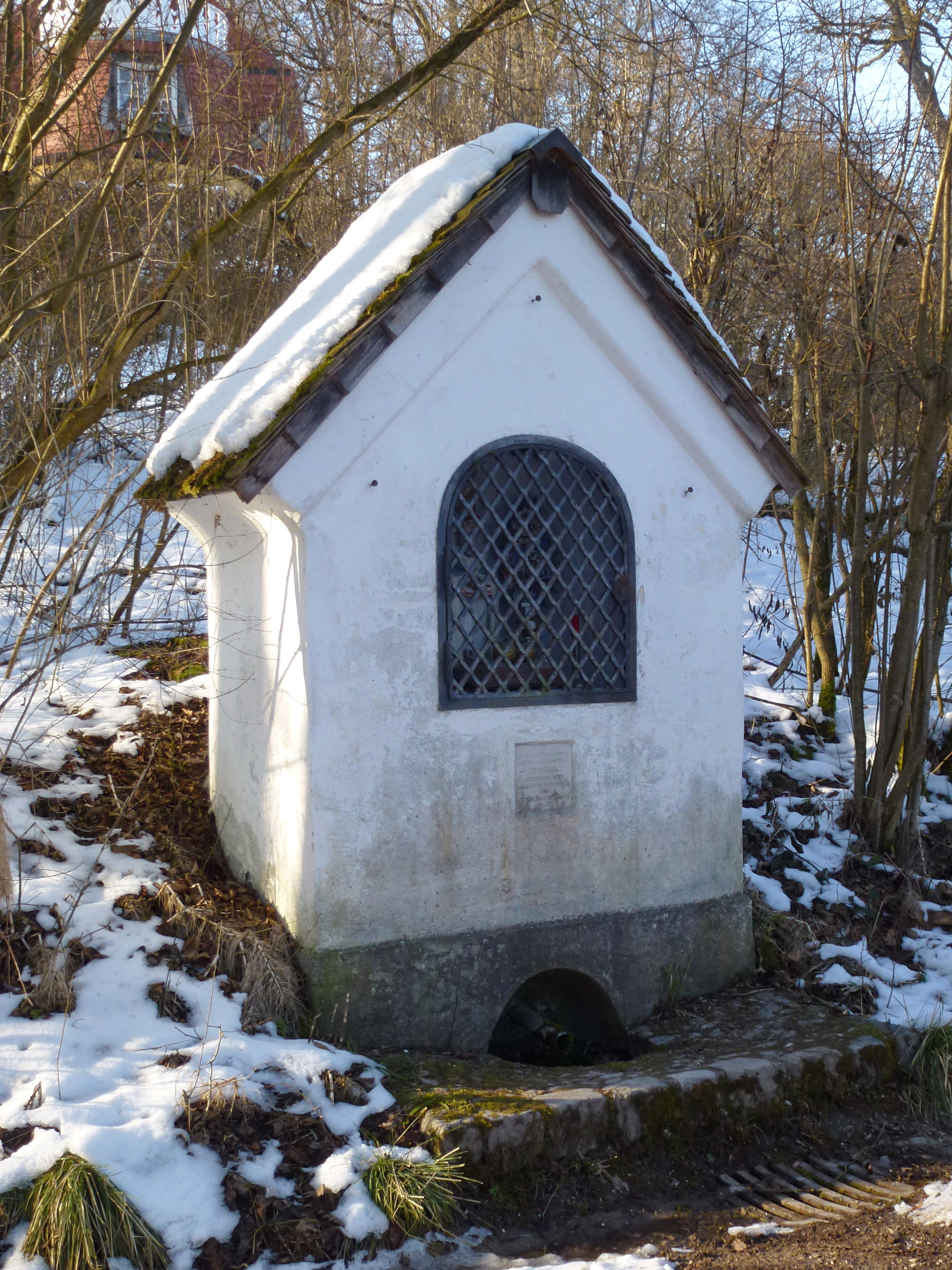 Eching aA. - Bildhäuschen Kaaganger, Ansicht von SO. Das Bildhäuschen erinnert an eine früher hier stehende Kapelle, die dem Hl. Nikla (Nikolaus) geweiht war. Unterhalb ist eine gefasste Quelle